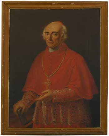 Carlo Cardinal Oppizzoni